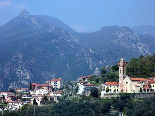 panorama di Bardino Nuovo